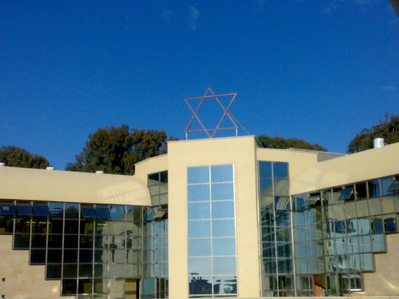 בניין הישיבה